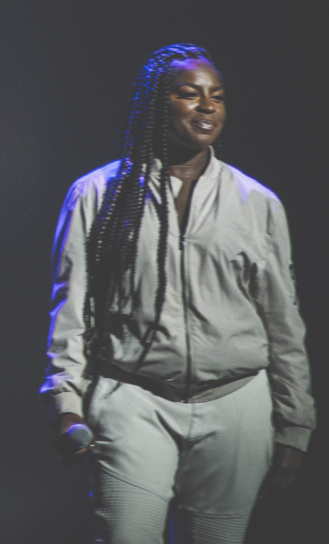 Anna Kendrick/Ester Dean